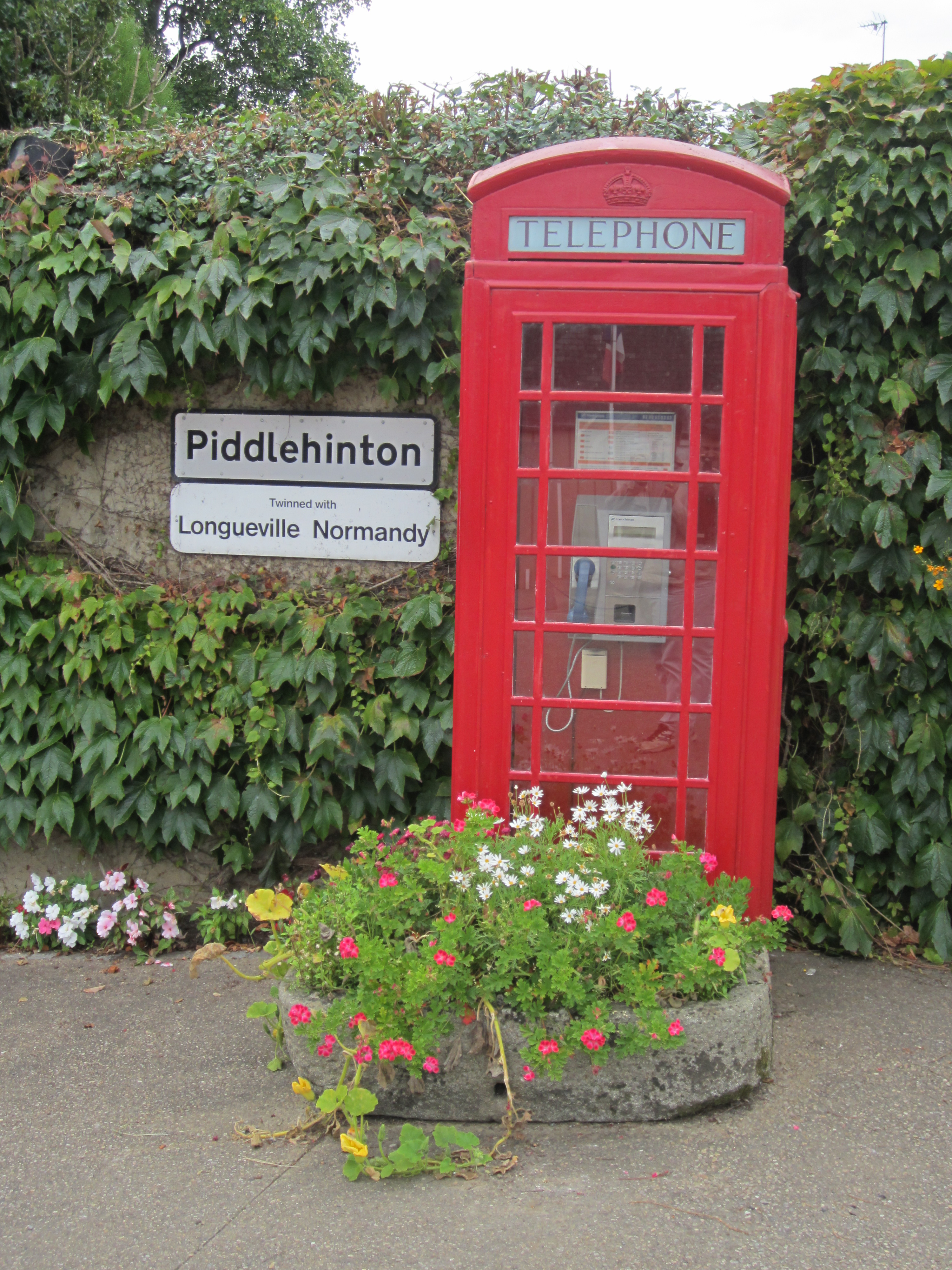 Longueville, Manche